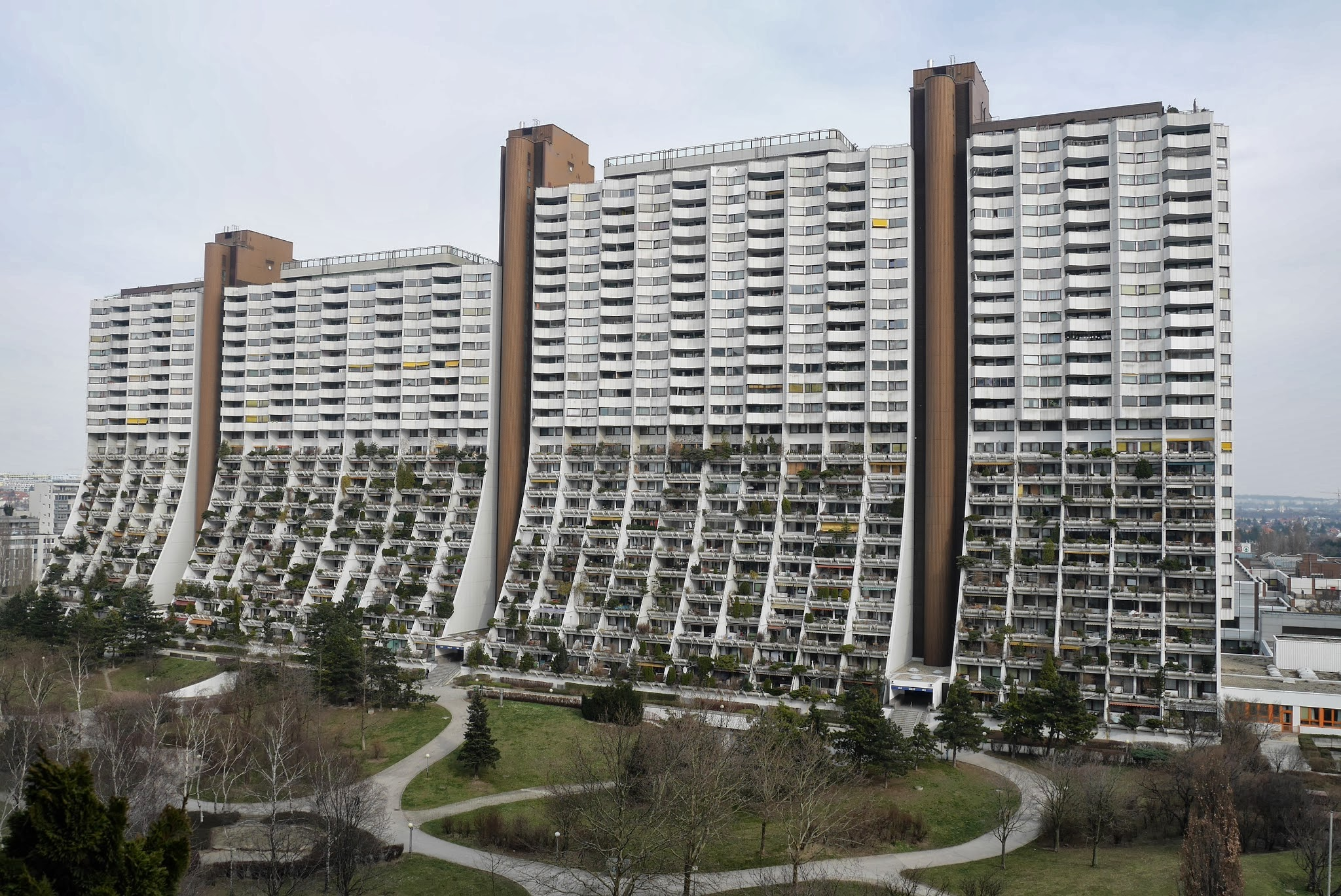 Atzgersdorf, 1230 Vienna, Austria